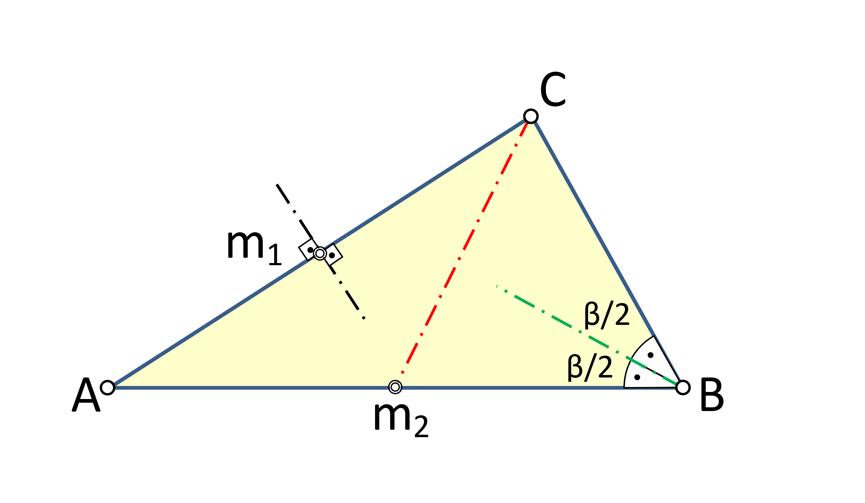 Lineas bisectoras: mediatriz (por m1), mediana (por m2) y bisectriz (por B)